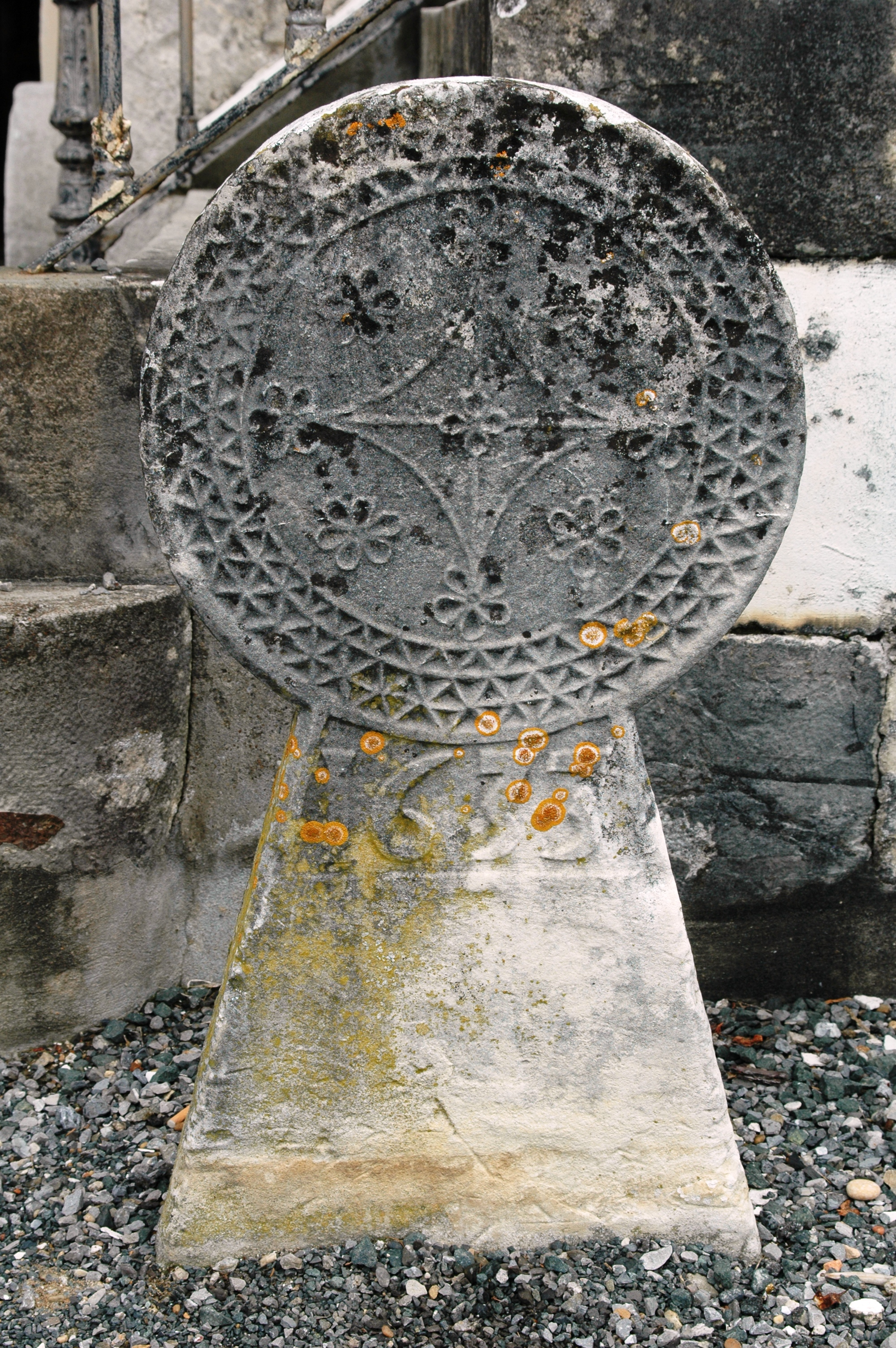 Urcuit, stèle discoïdale